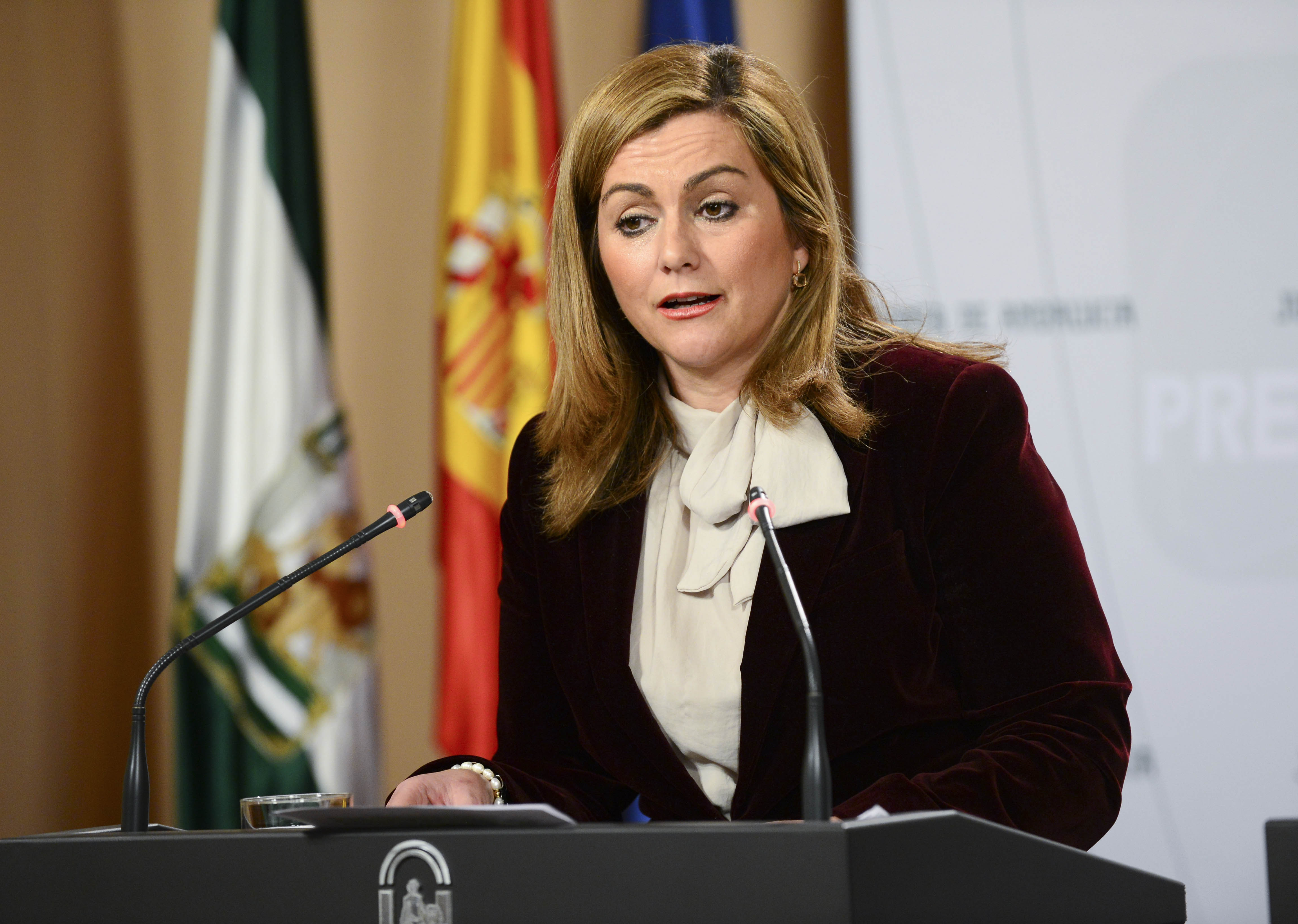 La consejera de Medio Ambiente y Ordenación del Territorio de la Junta de Andalucía